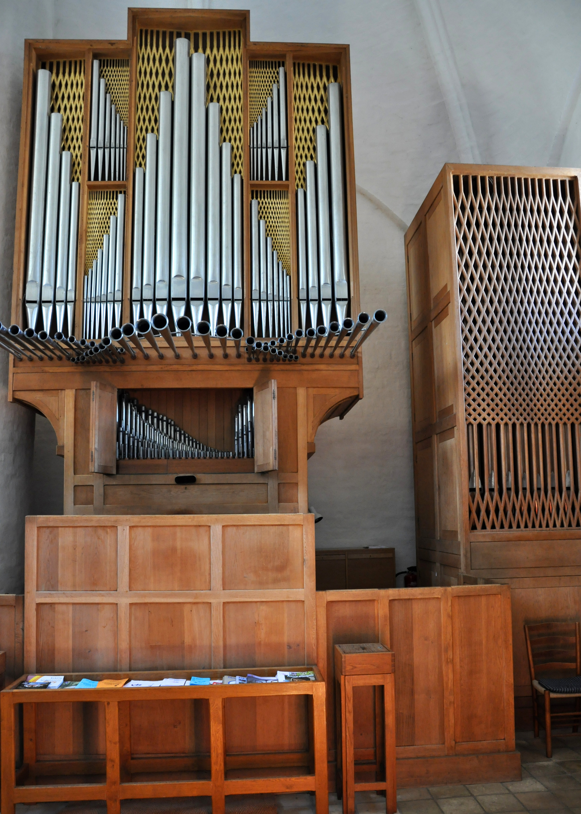 Orgel Sct. Nicolai Kirke Aabenraa/Apenrade, Dänemark